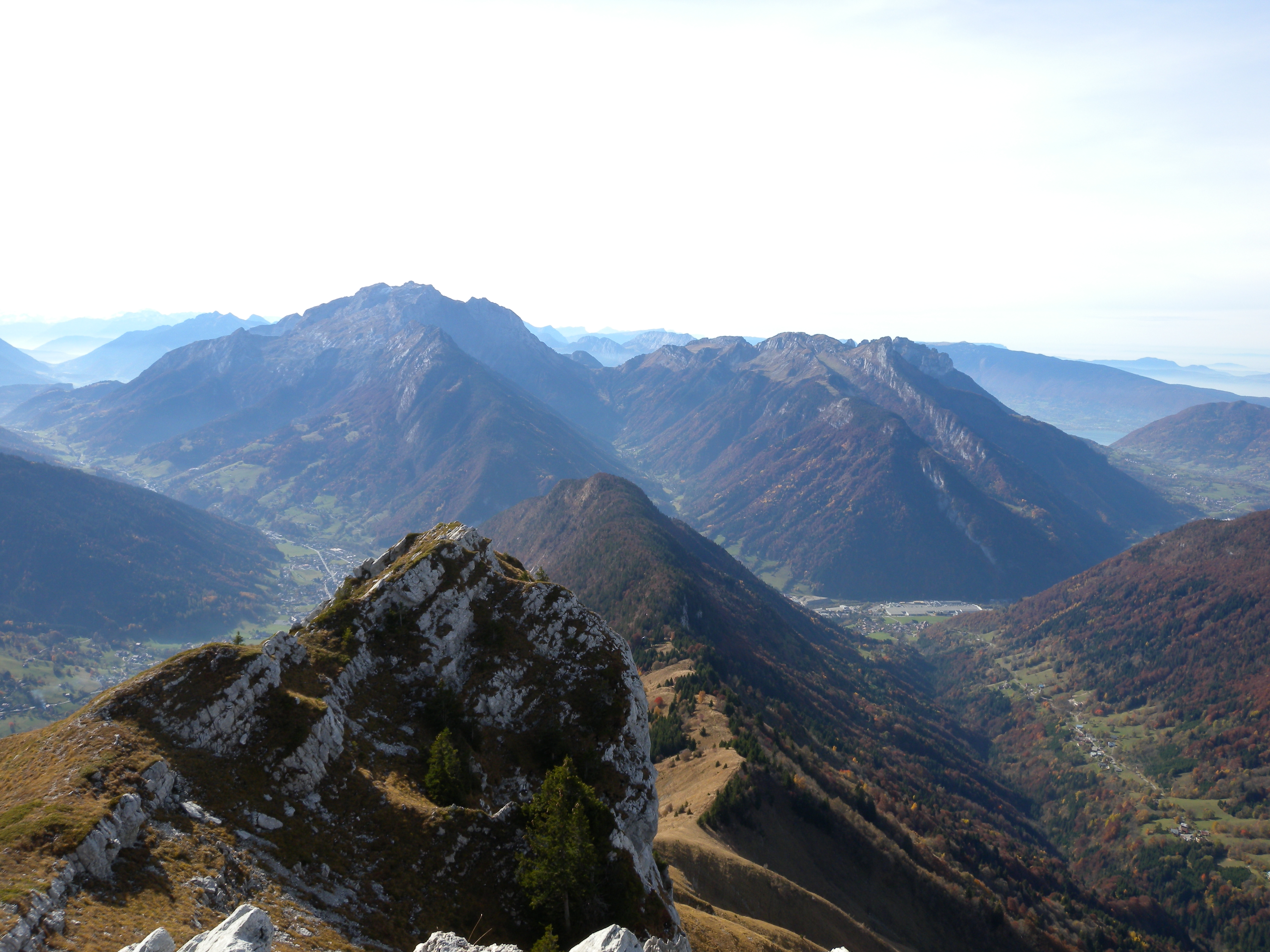 La Tournette - La vallée de Montremont - Les dents du Cruet